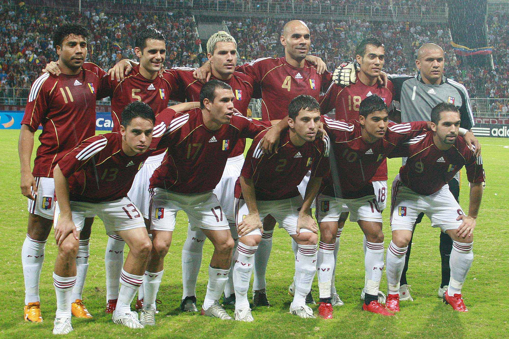 Selección de la Vinotinto se prepara para enfrentar a la oncena chilena. Arriba de izquierda a derecha: Alexander Rondón, Miguel Mea Vitali, José Manuel Rey, Jonay Hernández, Juan Arango y Renny Vega. Abajo de izquierda a derecha: Leonel Vielma, Jorge Rojas, Gerzón Chacón, Ronald Vargas y Giancarlo Maldonado.